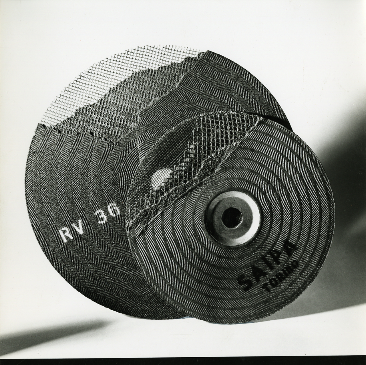 Vetrotessile. Fibre di vetro. Tessuti. Armature. Servizio fotografico : Italia, 1978 / Paolo Monti. - Stampe: 4 : Positivo b/n, gelatina bromuro d'argento/ carta, 18x24, 24x30. - ((Al verso delle stampe iscrizioni didascaliche manoscritte a matita e a pennarello su striscia adesiva in carta bianca; timbri a inchiostro con copyright (Foto "Fotogramma" s.r.l. - Via Colonna - Milano e Via Colonna - Milano). - Sul coperchio della scatola iscrizione didascalica manoscritta a pennarello nero: "Scultura".